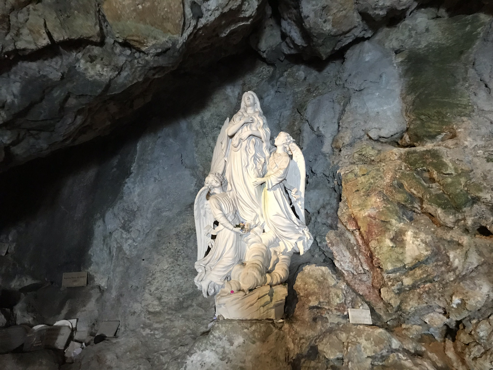 Beeld Maria Magdalena in grot in de bergketen ‘Massif-de-la-St.-Baume waar Maria Magdalena volgens de overlevering 30 jaar verbleven heeft na haar aankomst in Frankrijk